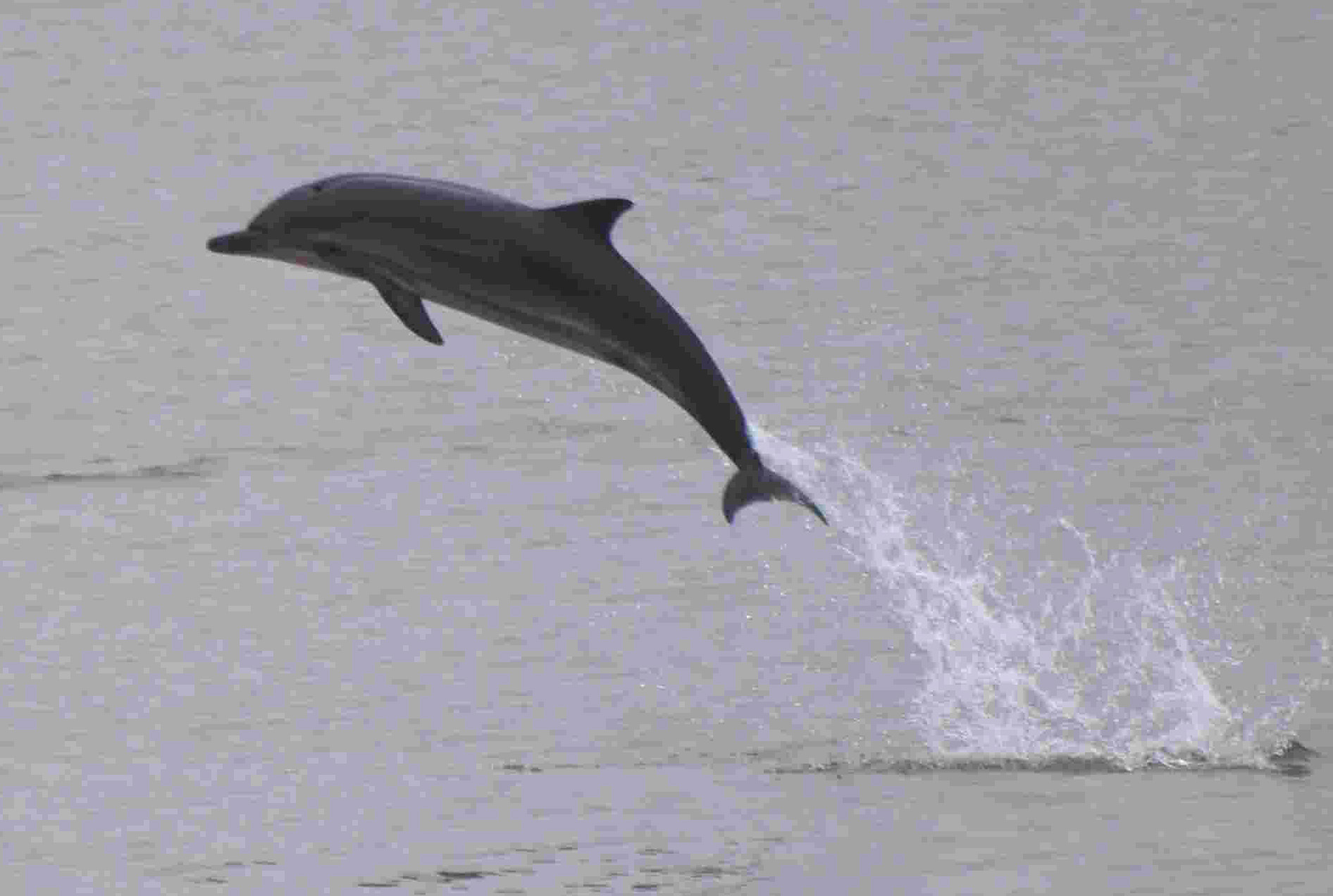 Delfines en el puerto de Gijón o El Musel, en el Principado de Asturias